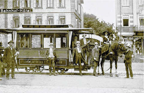 Das war die Pferdebahn